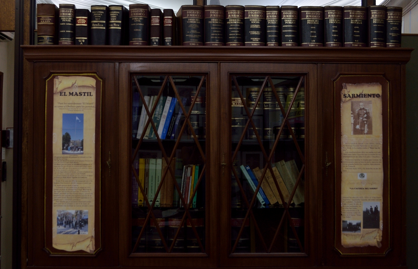 Mueble de estilo, en el cual se archivaron todo tipo de libros referidos al quehacer de los Abogados.